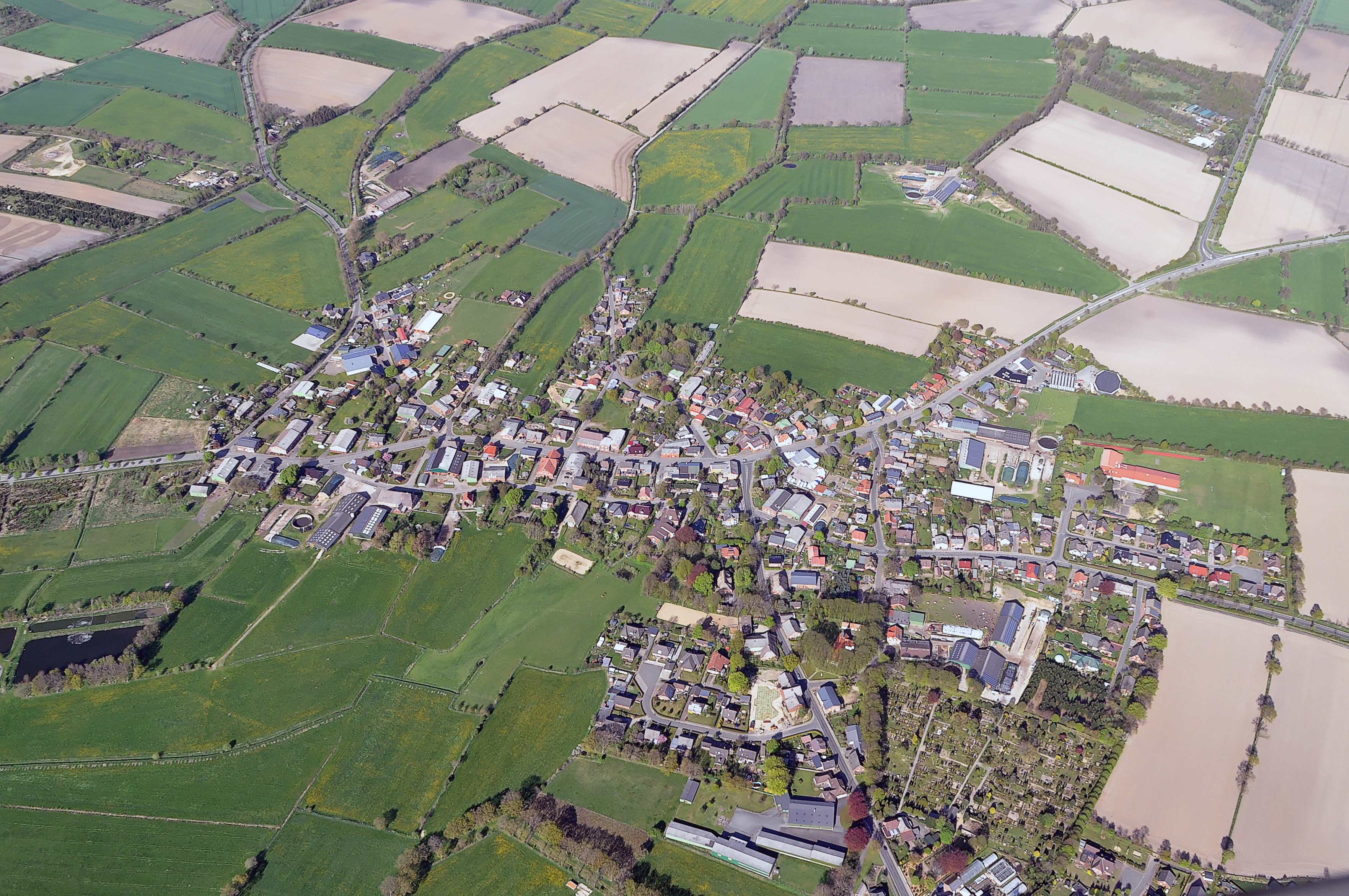 Luftbilder von der Nordseeküste 2012-05